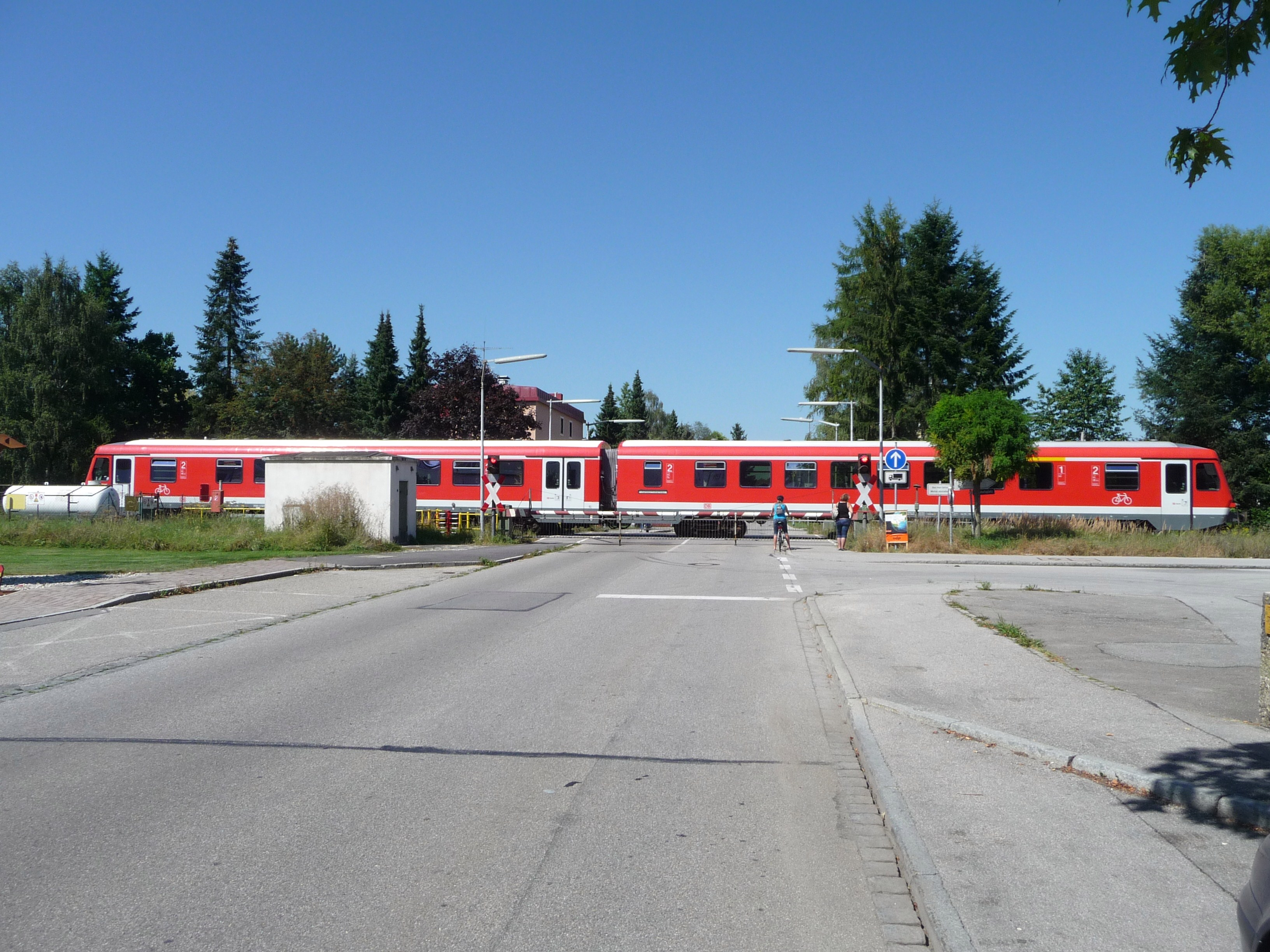 Ein Zug der Bahnstrecke Mühldorf–Simbach am Inn in Töging